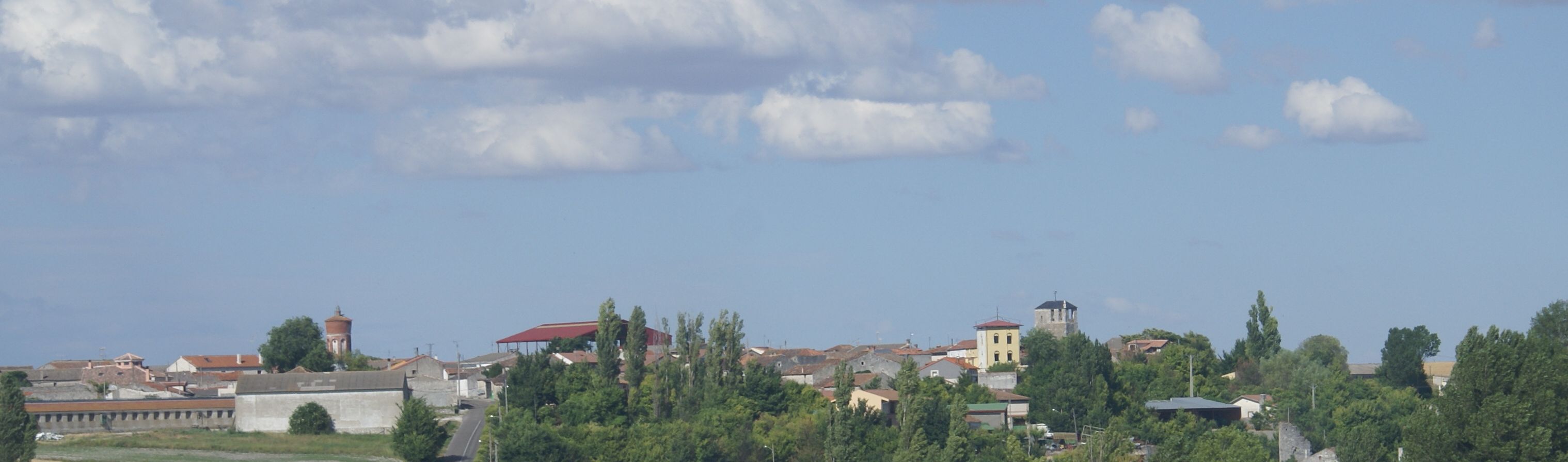 Vista de Viloria, Valladolid